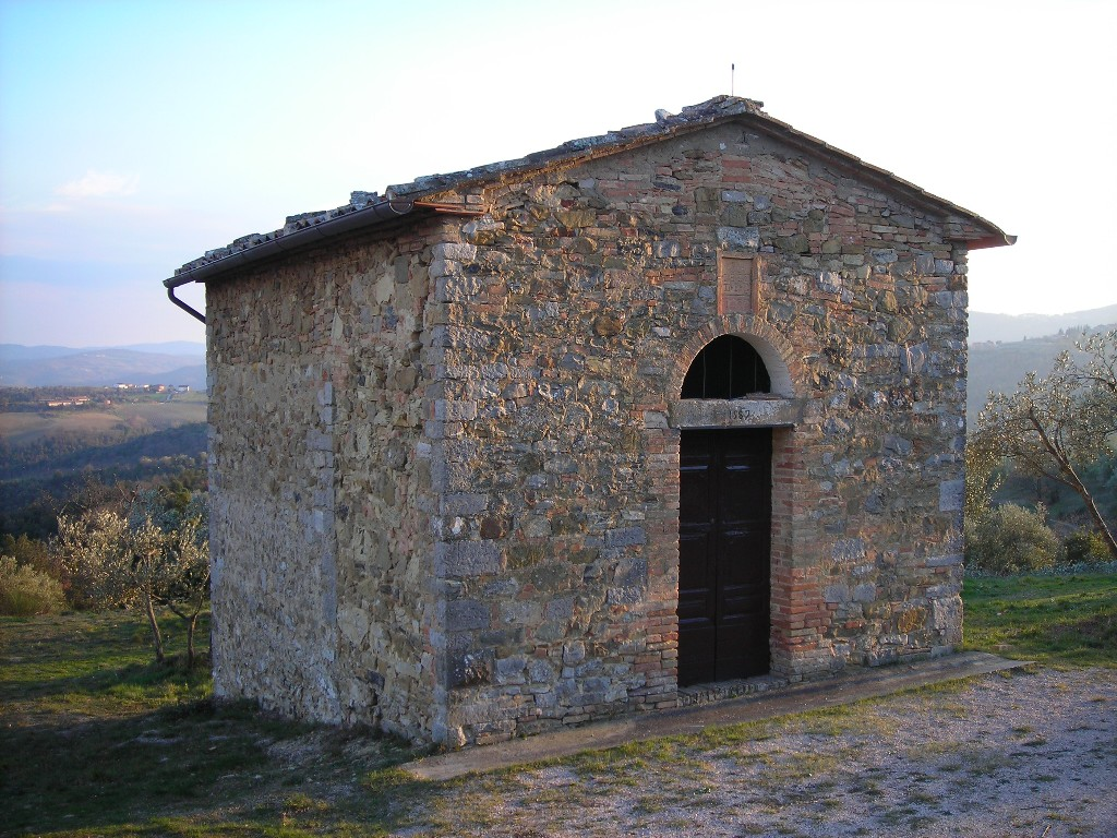 Santa Maria della Neve, Montelagello, Marsciano, Perugia, Umbria, Italy